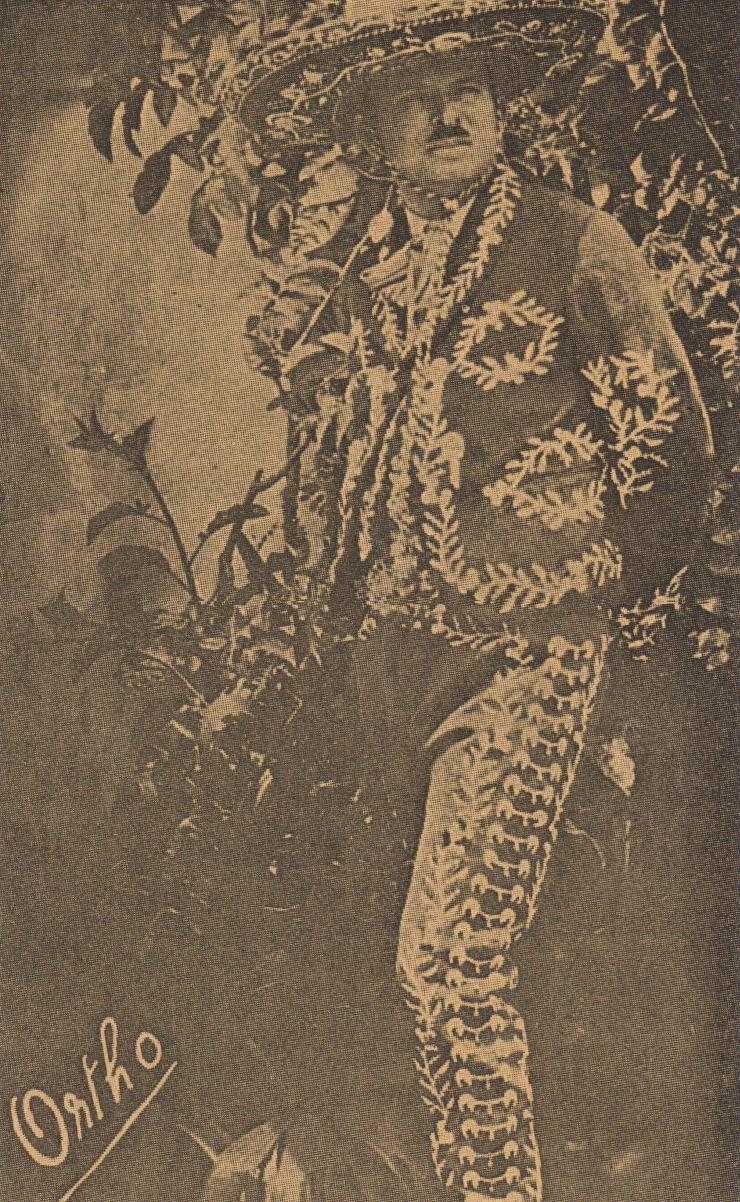 Oficial Tomás Garrido Canabal